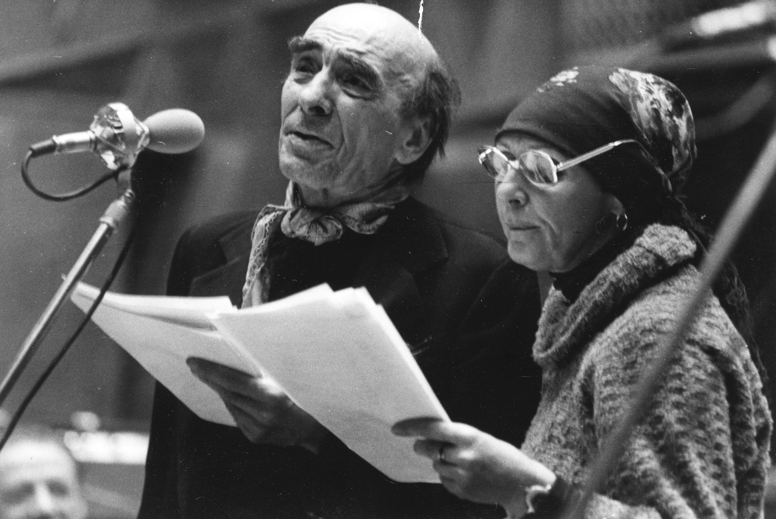 Rádiókabaré felvétele, Jenő és Lujza: Major Tamás és Psota Irén színművészek. Location: Hungary, Budapest VIII. Tags: Budapest Title: Rádiókabaré felvétele, Jenő és Lujza: Major Tamás és Psota Irén színművészek.